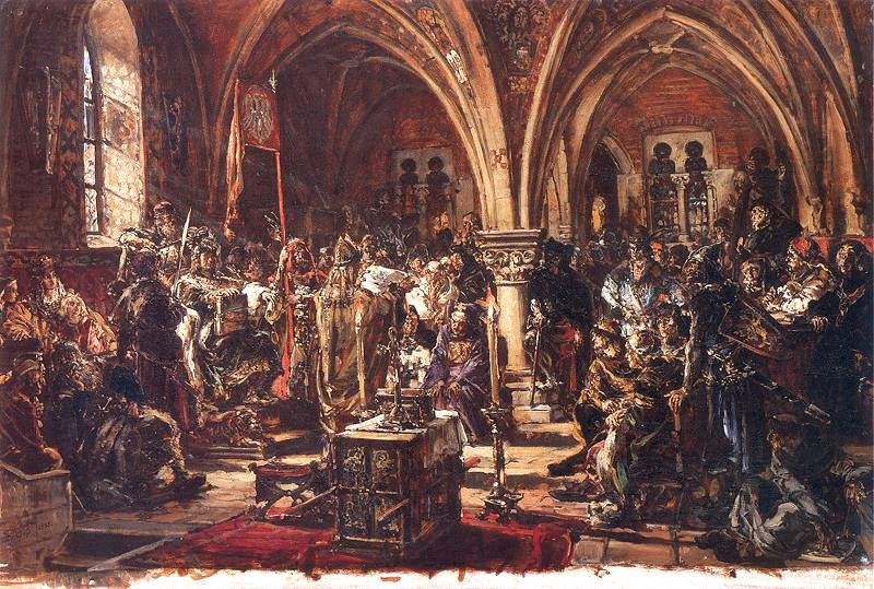 W Łęczycy pierwszy sejm. Spisanie praw. Ukrócenie rozbojów. R.P. 1182.